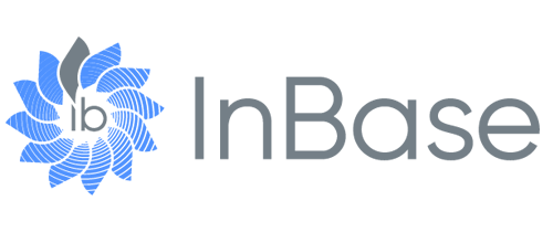 Logo InBase